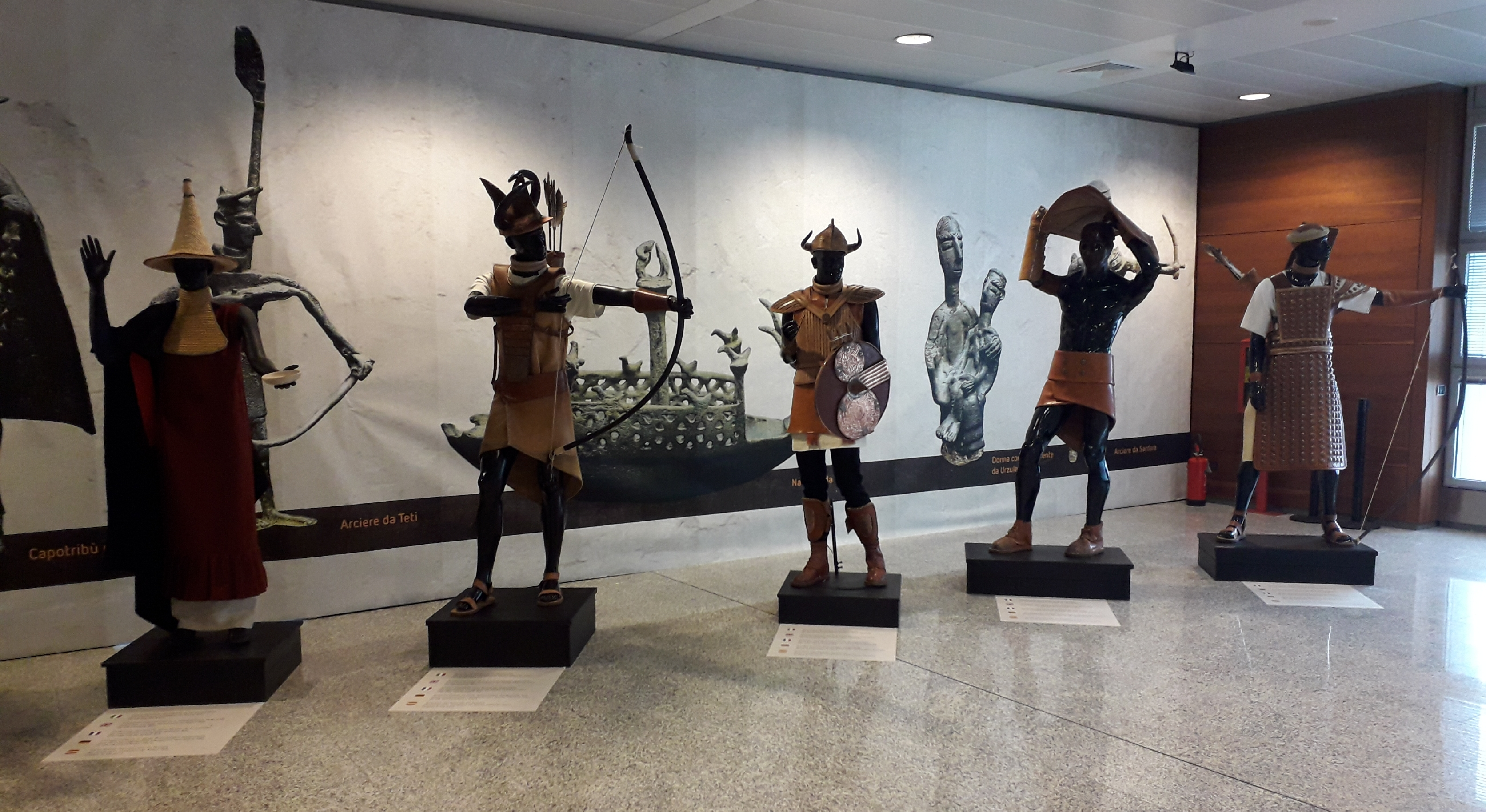 Ricostruzione costumi nuragici, mostra aeroporto di Cagliari-Elmas 2018